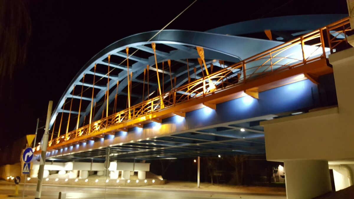 Nocne ujęcie wiaduktu kolejowego WK15 nad ulicą grabiszyńską we Wrocławiu